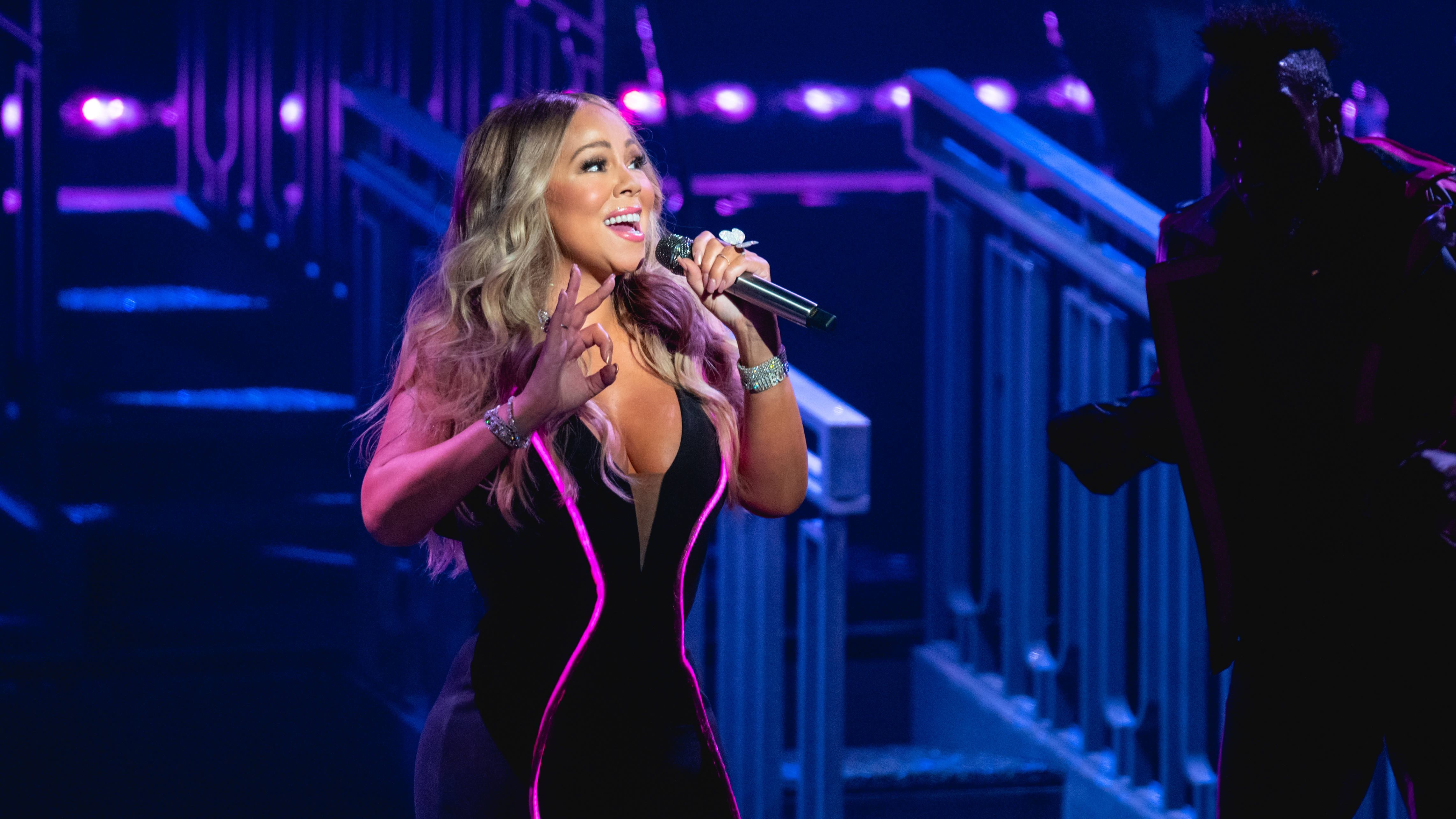 MariahRAH270519-27